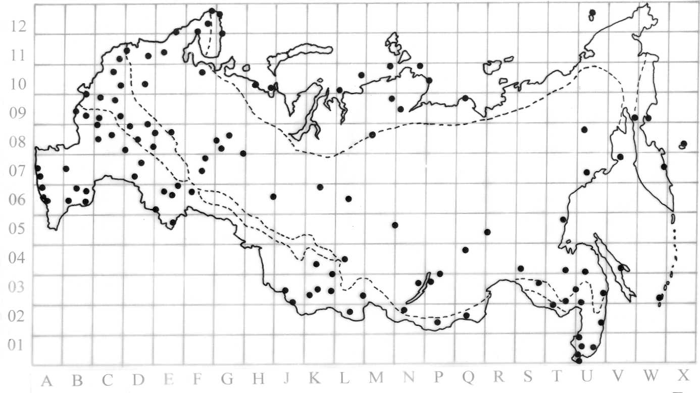 Заповедники России Setswana: Map of Russian zapovedniks